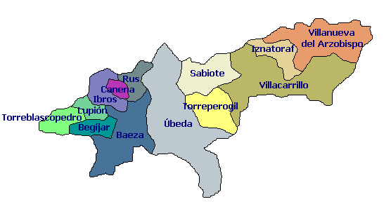 Mapa de la comarca de la Loma y las Villas, y de sus distintos municipios. Realizado por Johnbojaen.